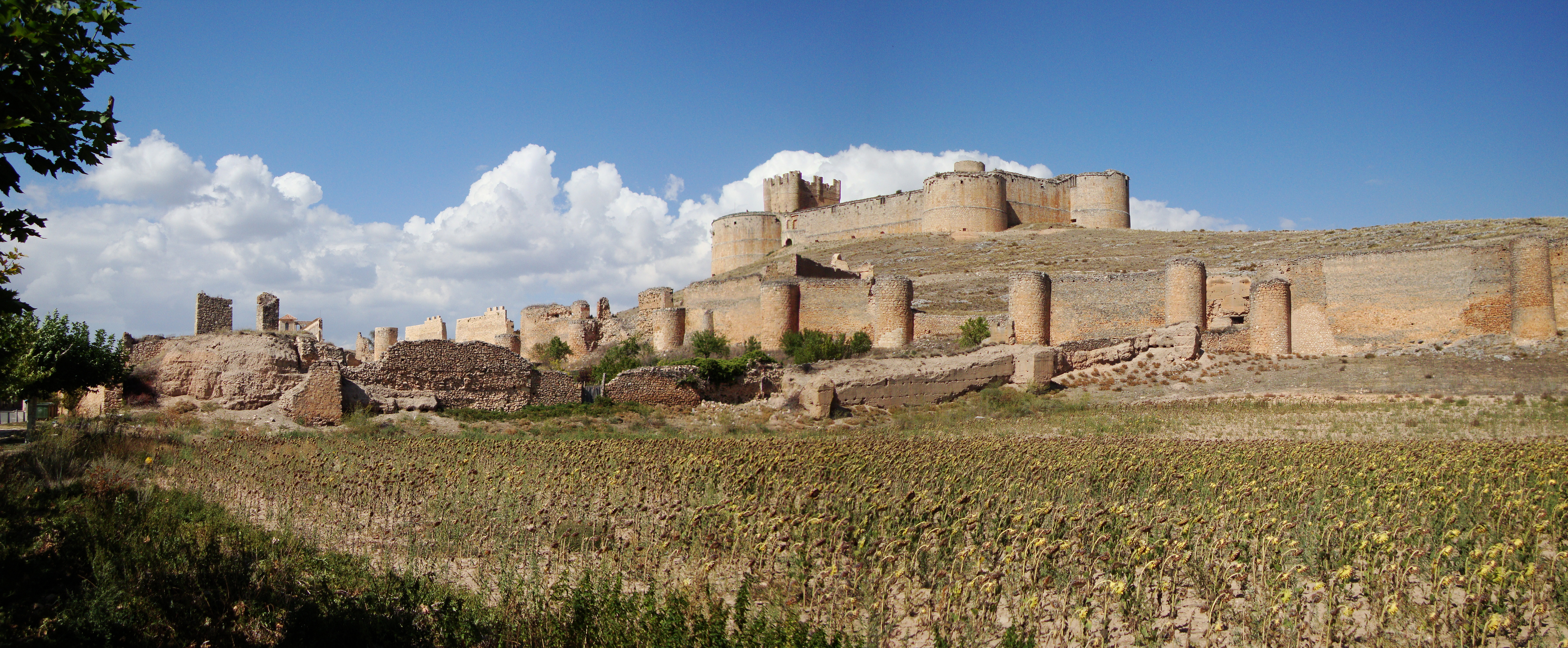 El Castillo de Berlanga, de matriz renacentista de la antigua "Escuela Italiana", fue construido en 1527 por el Maestre Benedicto, tal vez milanés, el mismo que construyó los Castillos de Gibraltar y Melilla, que todavía se conservan. El ingeniero Benedicto fue traído por D. Juan de Tovar, a quien el Emperador Carlos I, por sus grandes servicios en los campos de Europa le concedió el título de Duque de Frías. Su fábrica, envuelve al primitivo Castillo cristiano del siglo XII (en cuya Torre, en el XVI, fueron incrustados los Escudos de Armas de los Velasco y Tovar), a su vez aprovechando los muros de la alcazaba árabe-califal del siglo X. Ocupan estas construcciones el cerro escarpado que por el Norte corta el río Escalote, y por el Sur el maravilloso frente de murallas y cubos almenados, grueso y de baja altura, obra románico-bélica del siglo XII, levantado por Alfonso I El Batallador, repoblador de Berlanga en gran parte con judíos de Zaragoza, a los que fue asignado el barrio que aún subsiste, el de la Yubería" Pero el Castillo hecho por Benedicto en el siglo XVI, es de traza cuadrangular, de sólidos y grandes cubos escarpados en los cuatro ángulos, con parapetos atronerados para los cañones y plazas bajas para el flanqueo. Son los cubos que en Italia inventaron Miguel Angel y Leonardo de Vinci, de neta inspiración técnica romana, y es, en definitiva, la composición de gruesos muros que muestra el histórico Castillo de Santángelo, junto al Tiber.